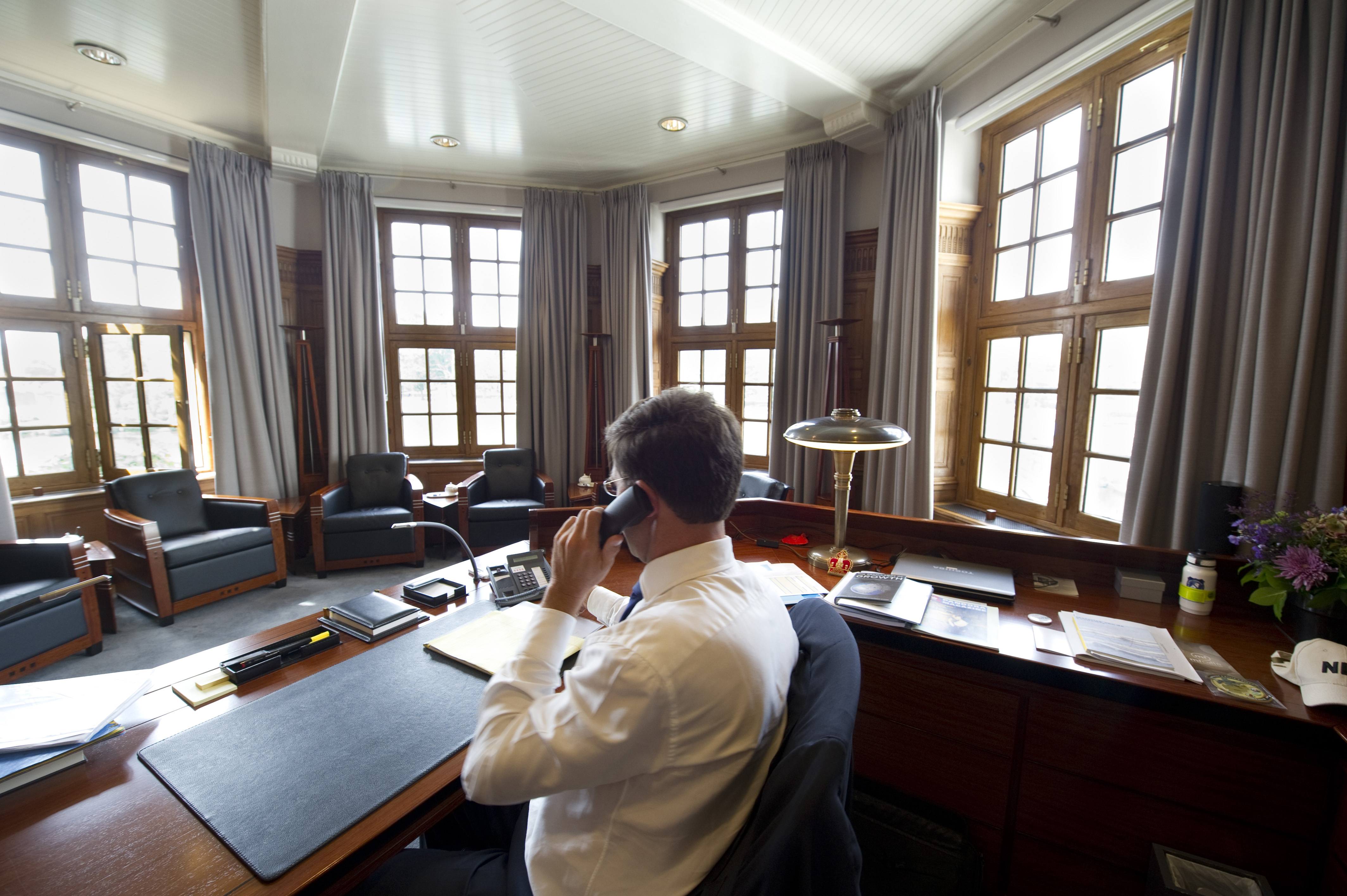 Minister-president Rutte belt vanuit het Torentje naar de Franse president Hollande in het Elysée. Zij spreken over het belang van een gezamenlijke aanpak voor stabiliteit in de eurozone.